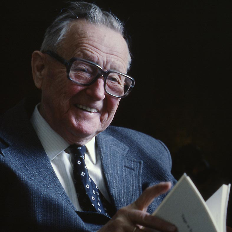 Forfatter Leif Halse, fotografert i 1978 hjemme i Levanger. Halse er mest kjent for "Vangsgutane".